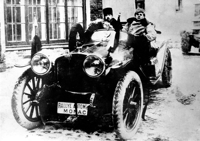 Руссо-Балт С-24/55 перед стартом ралли в Монте-Карло, 1912